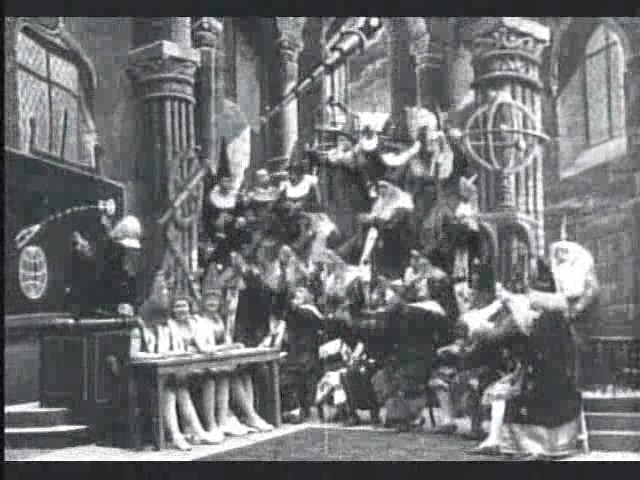 Méliès, viaggio nella luna (1902) 01